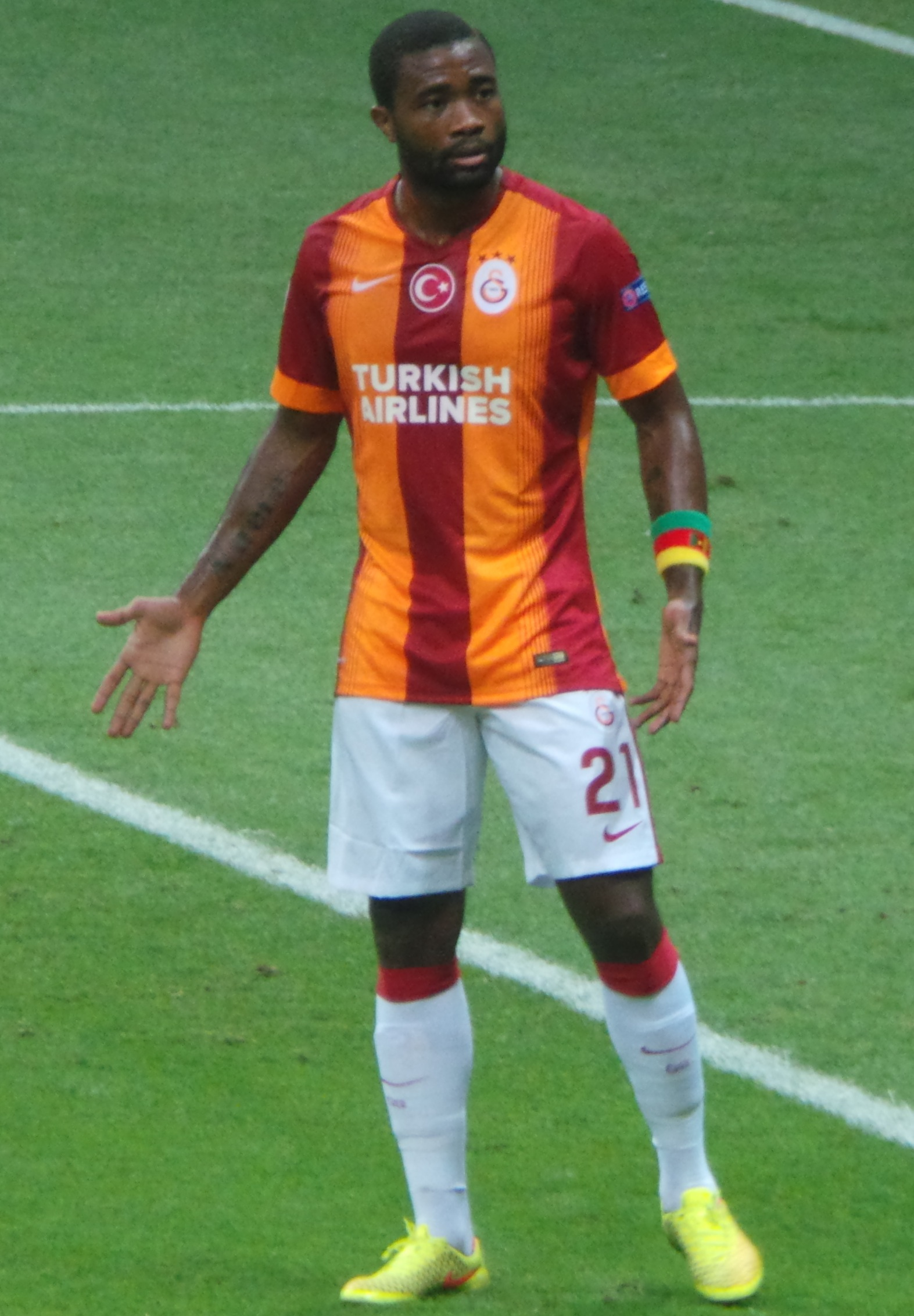 Chedjou vs Anderlecht